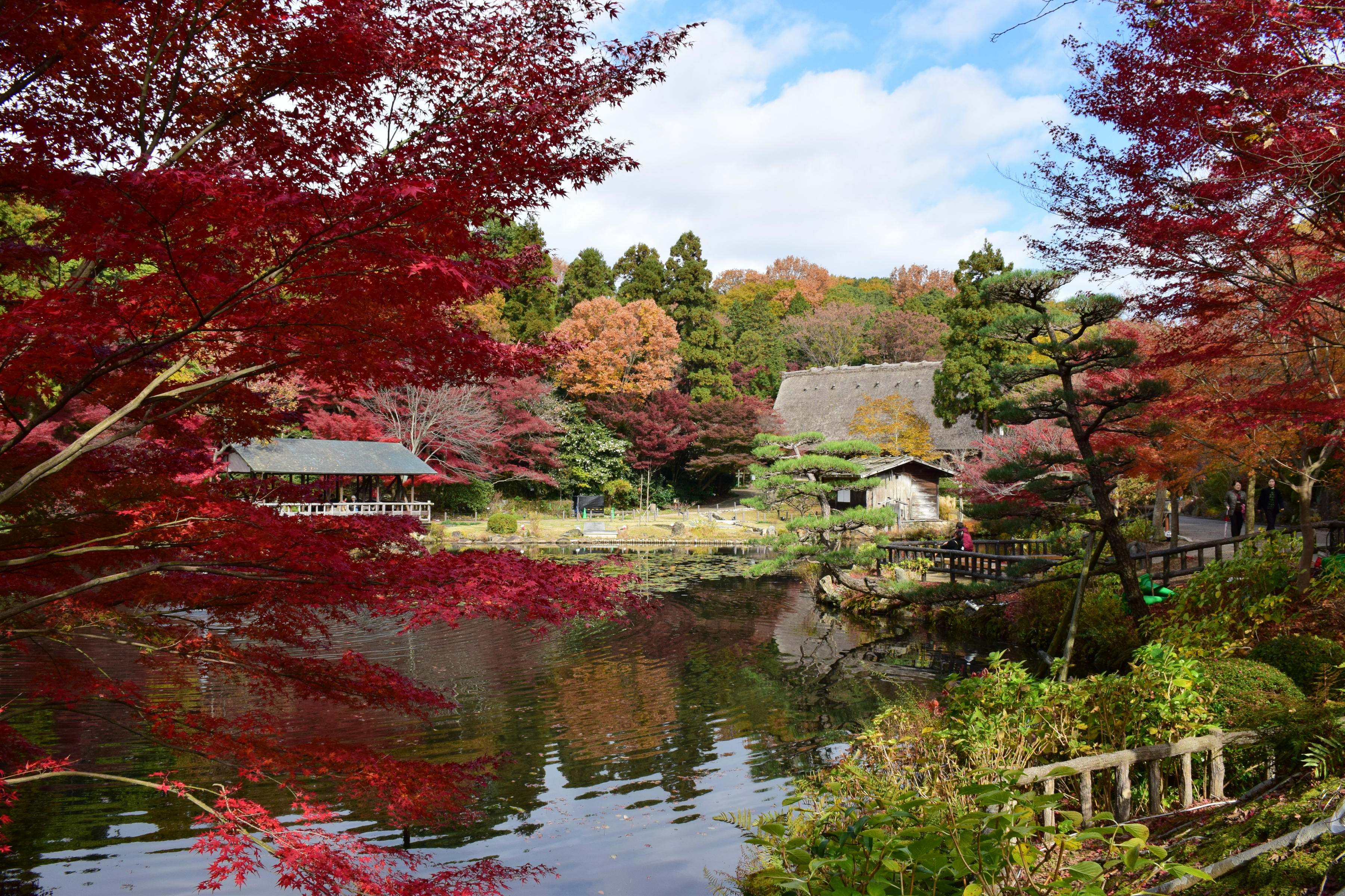 東山植物園